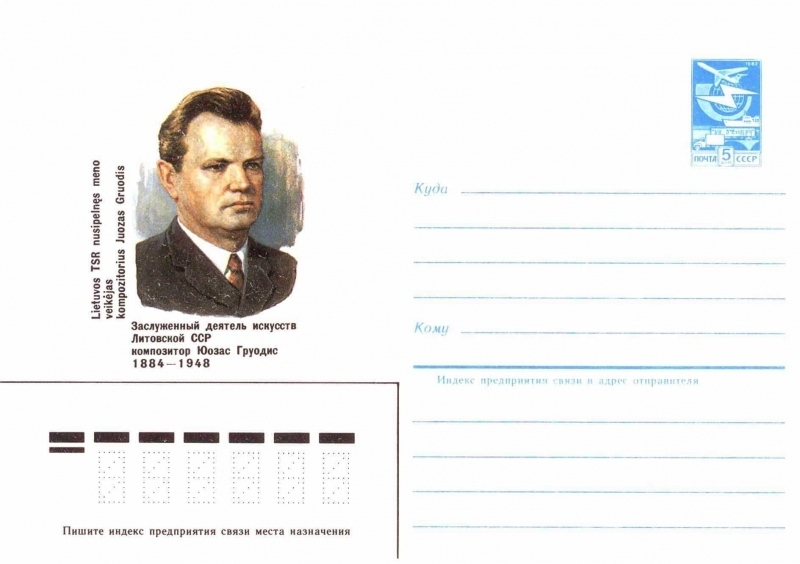 Художественные маркированные конверты 1983 года.